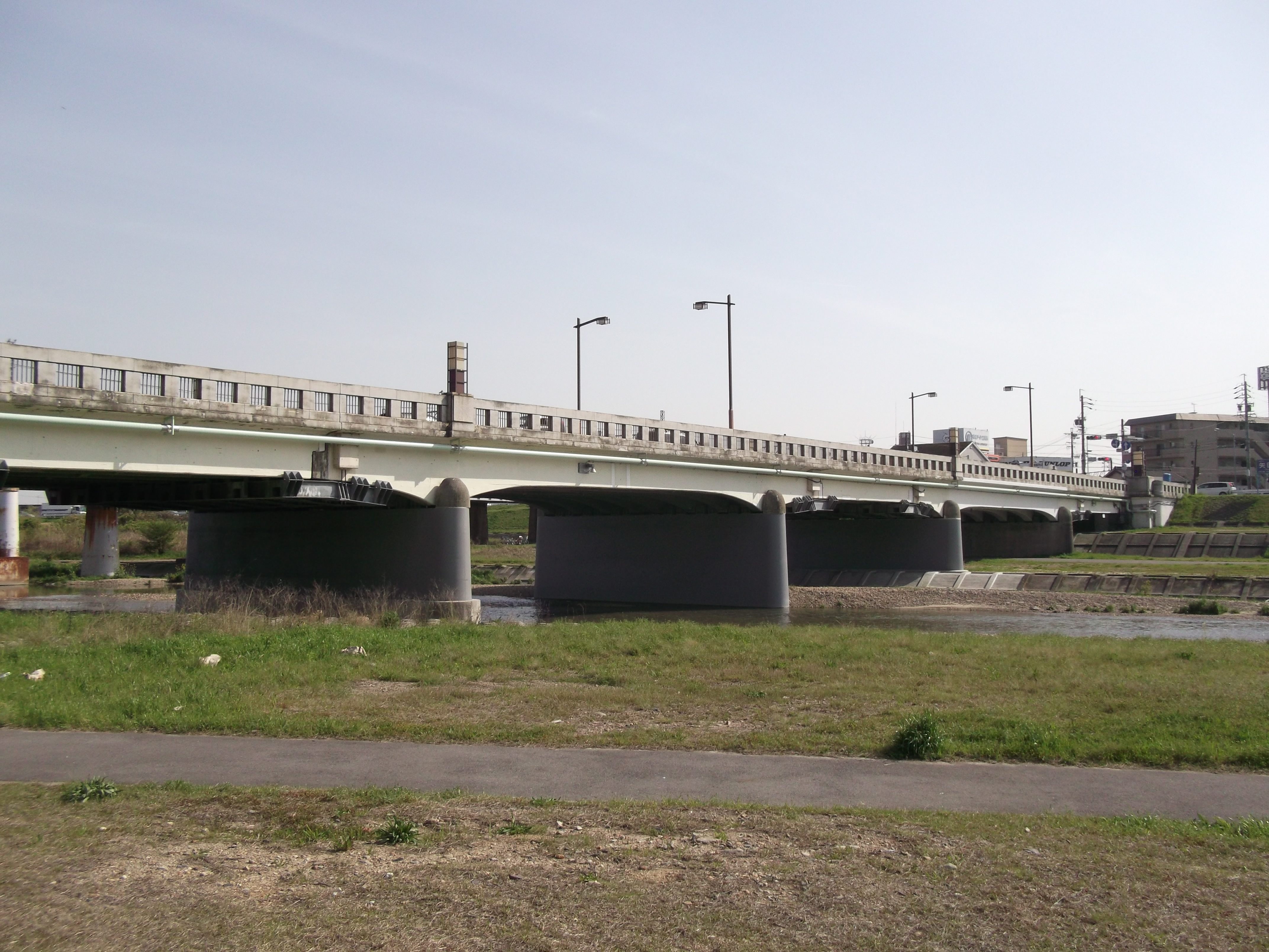 名古屋市守山区・北区の矢田川橋を北東側より撮影